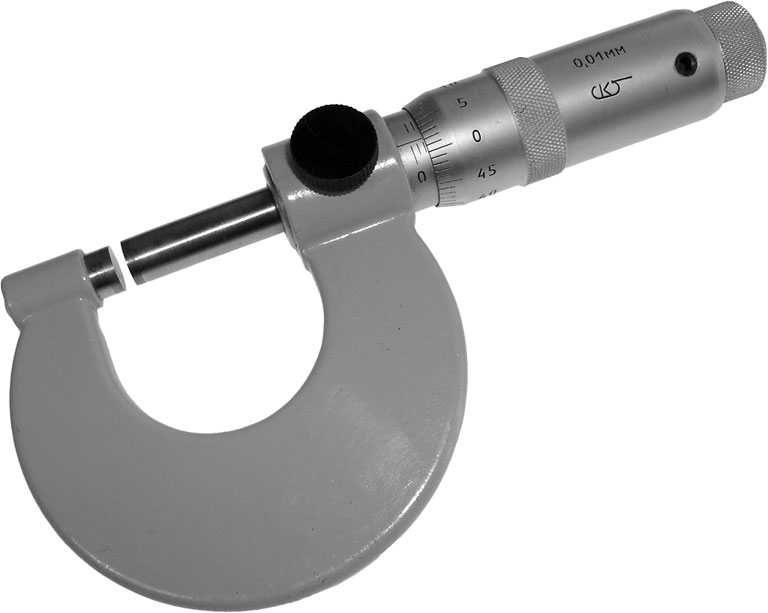 Motiv: Messschraube aus russischer Produktion. Fotograf: KMJ Aufnahmedatum: 2004-06-19 Aufnahmeort: Studio Bildname: Messschraube_01_KMJ.jpg Bildgröße: 768 Pixel x 613 Pixel (37.862 Bytes)